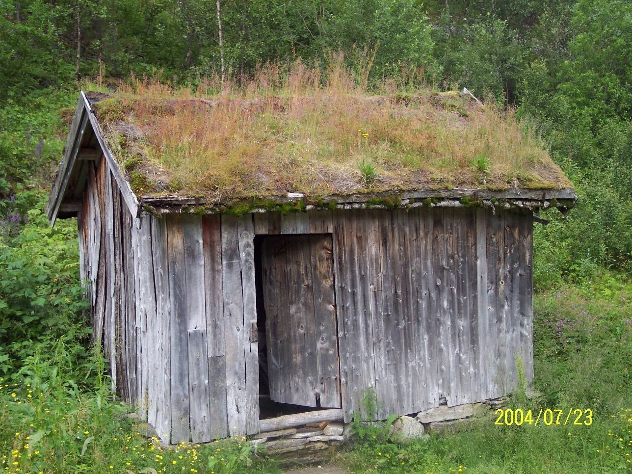 Husmannsbolig en eller anna plass omtrendt midt i nordland. Bilde tatt av Thor-Rune Hansen.